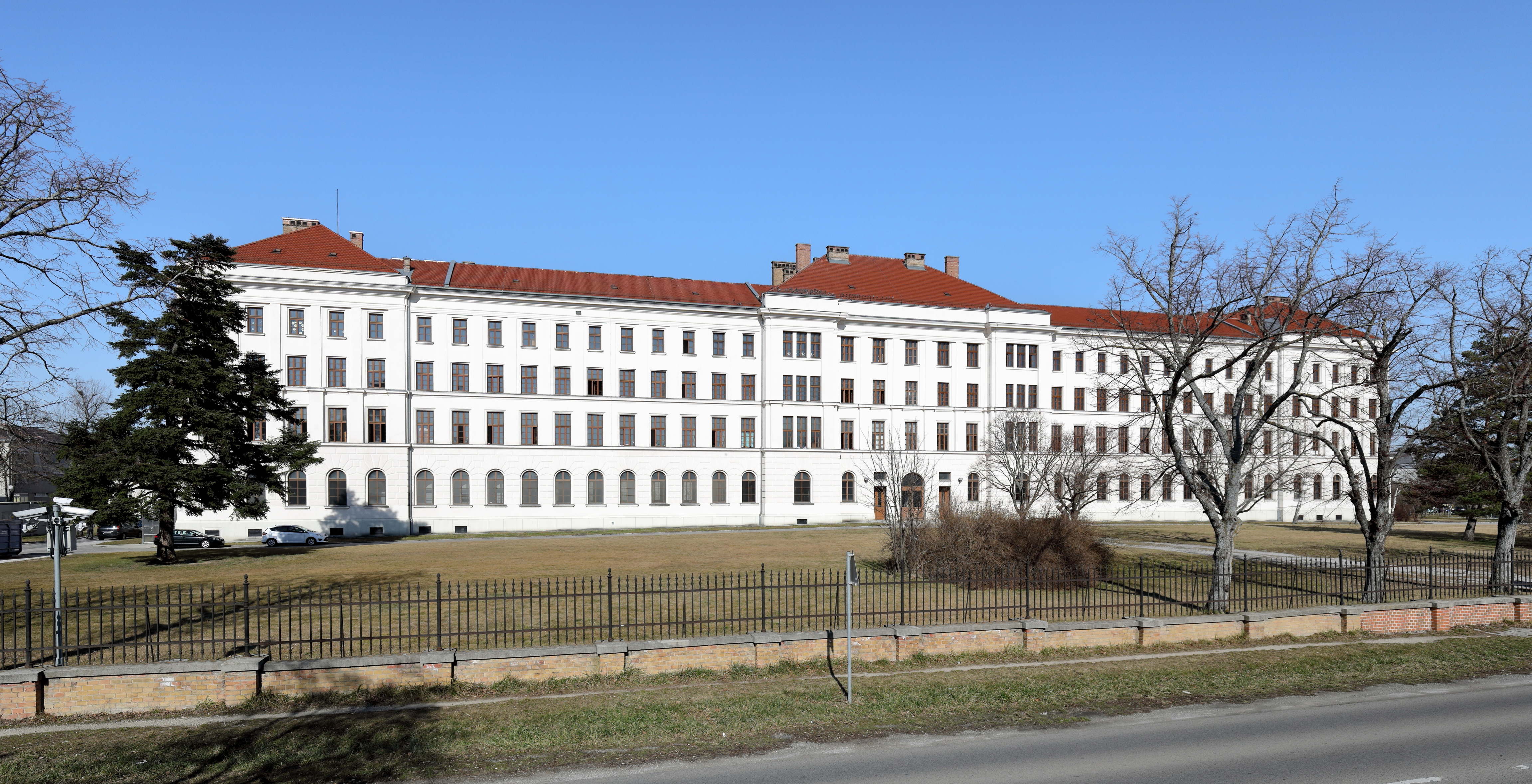 Südwestansicht des Hauptgebäudes der ehemaligen k.u.k. Artilleriekadettenschule in der niederösterreichischen Stadtgemeinde Traiskirchen. Sie wurde 1903 eröffnet und wird seit 1956 (Ungarnaufstand) als Flüchtlingslager genutzt. Neuzeitlich wird das „Flüchtlingslager Traiskirchen“ als „Bundesbetreuungsstelle Ost“ bezeichnet.